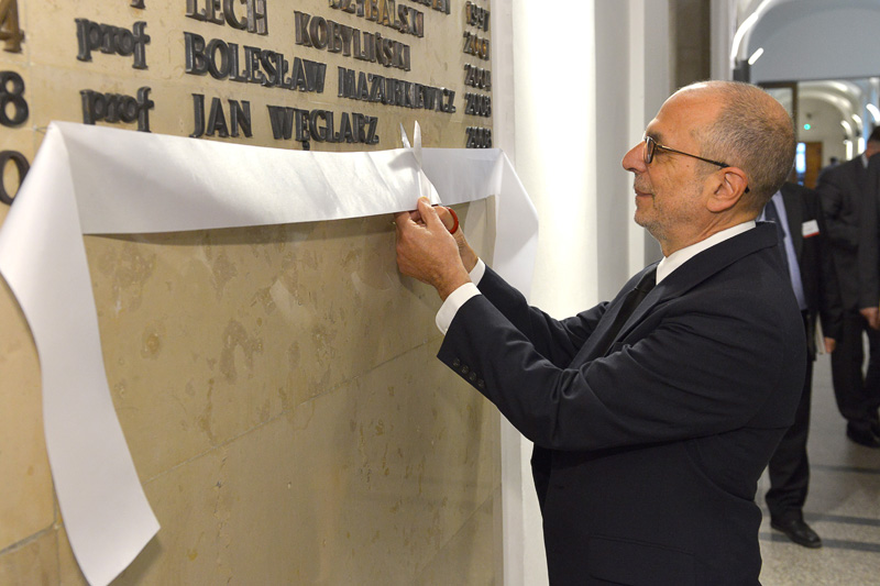 Prof. Robert J. Cava z USA.